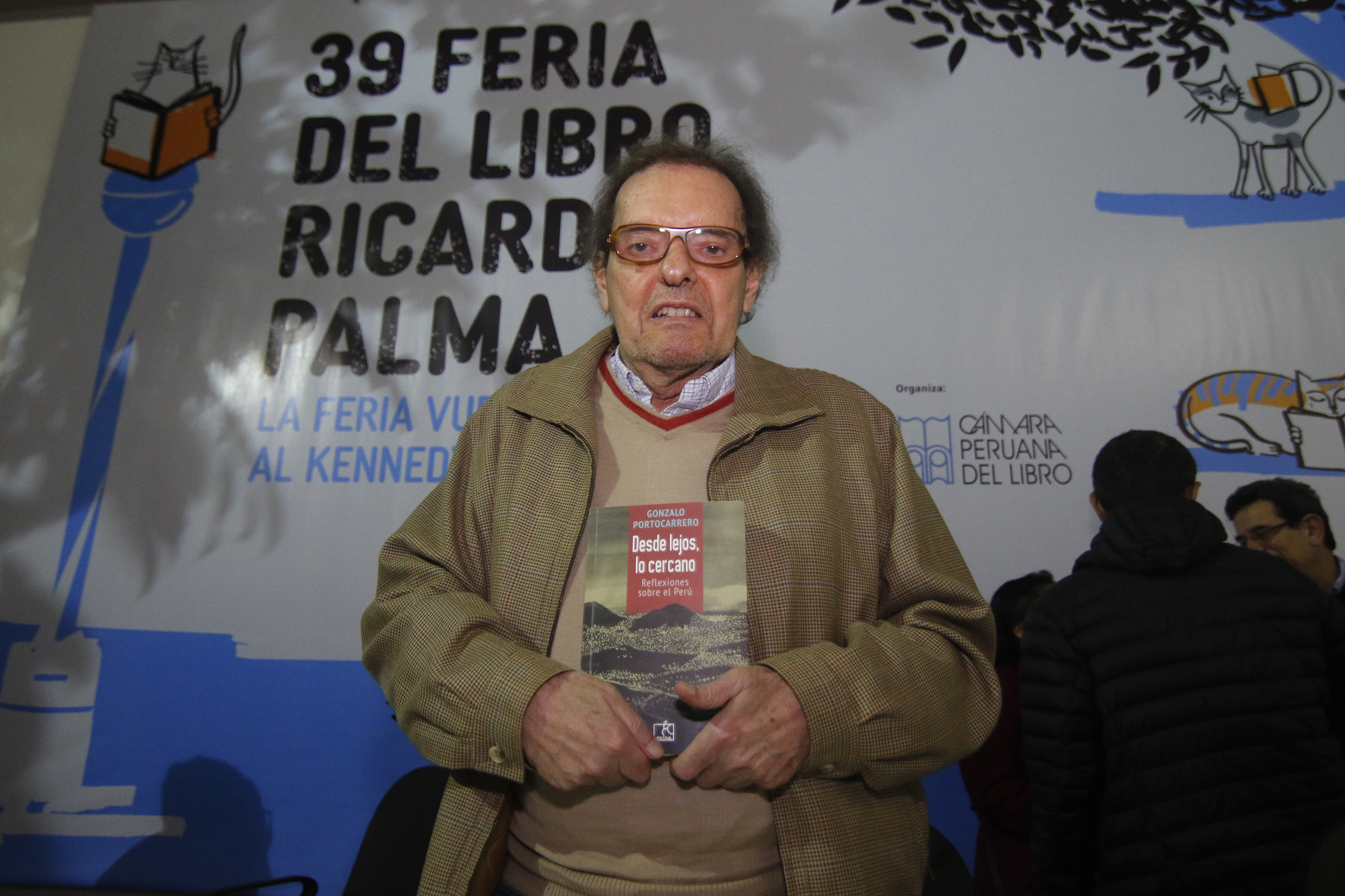 Gonzalo Portocarrero Maisch en 2018